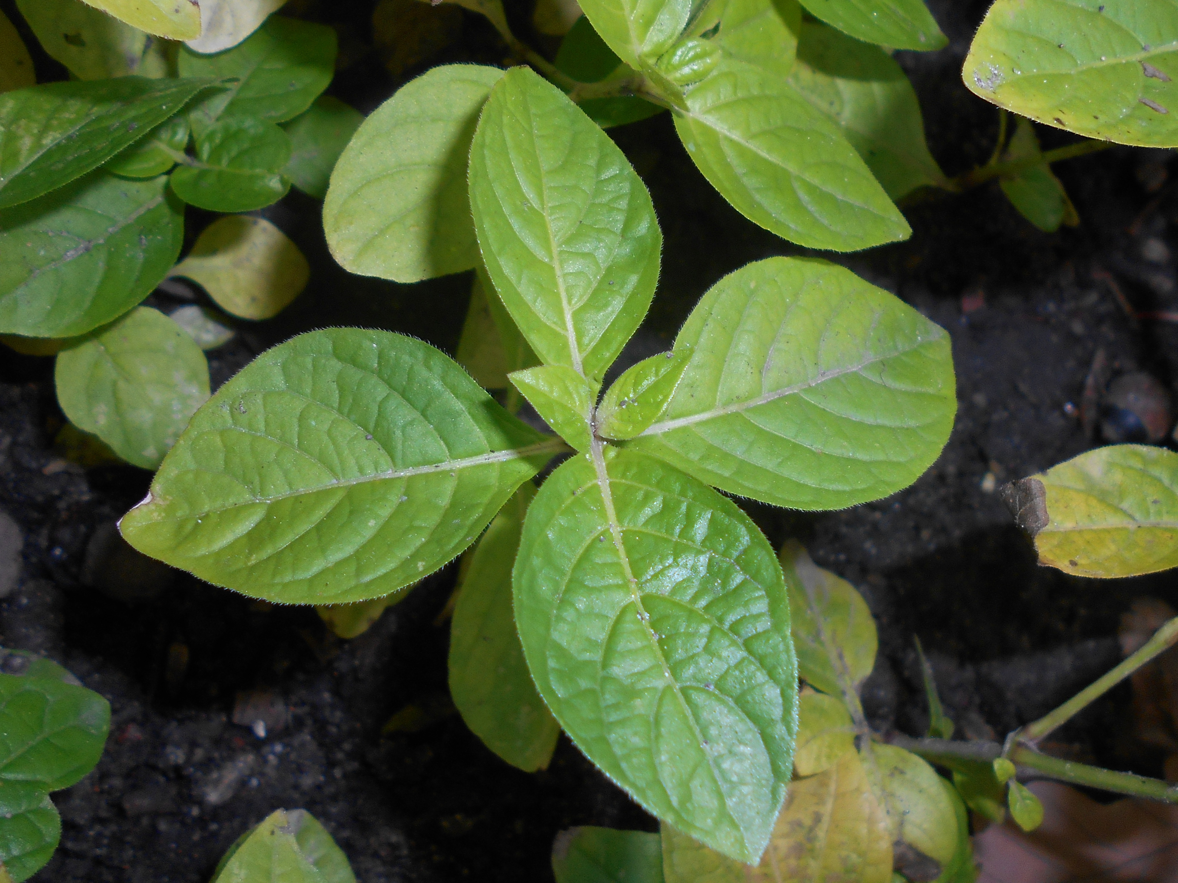 Ruellia strepens, Ogród Botaniczny Uniwersytetu Wrocławskiego.